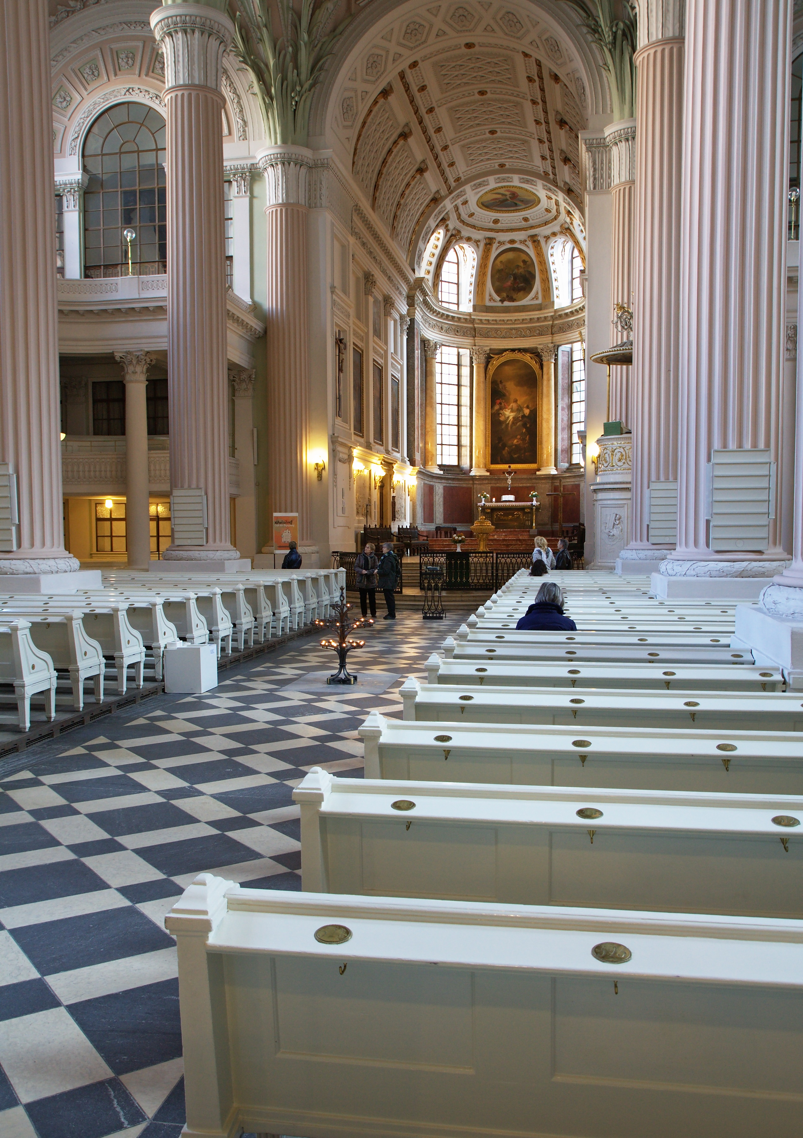 Innenansicht Nikolaikirche, Leipzig 2011.